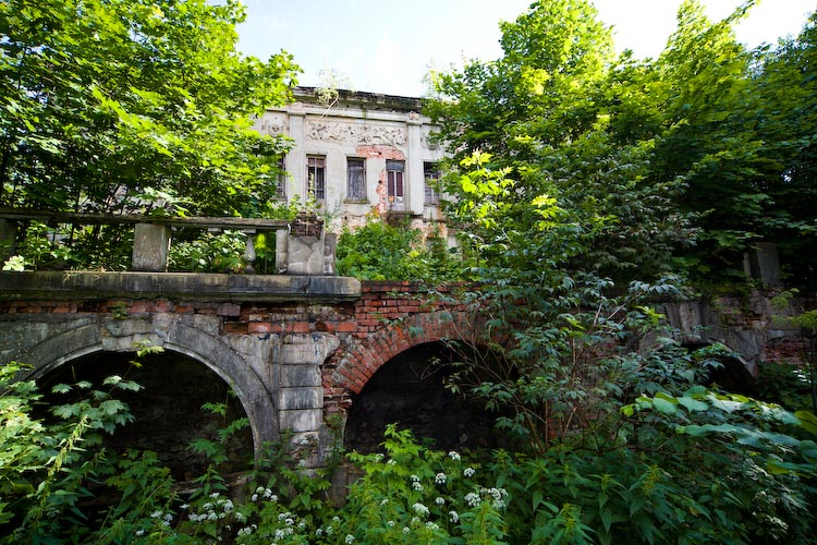 Руины усадьбы «Пущино-на-Оке». г. Пущино